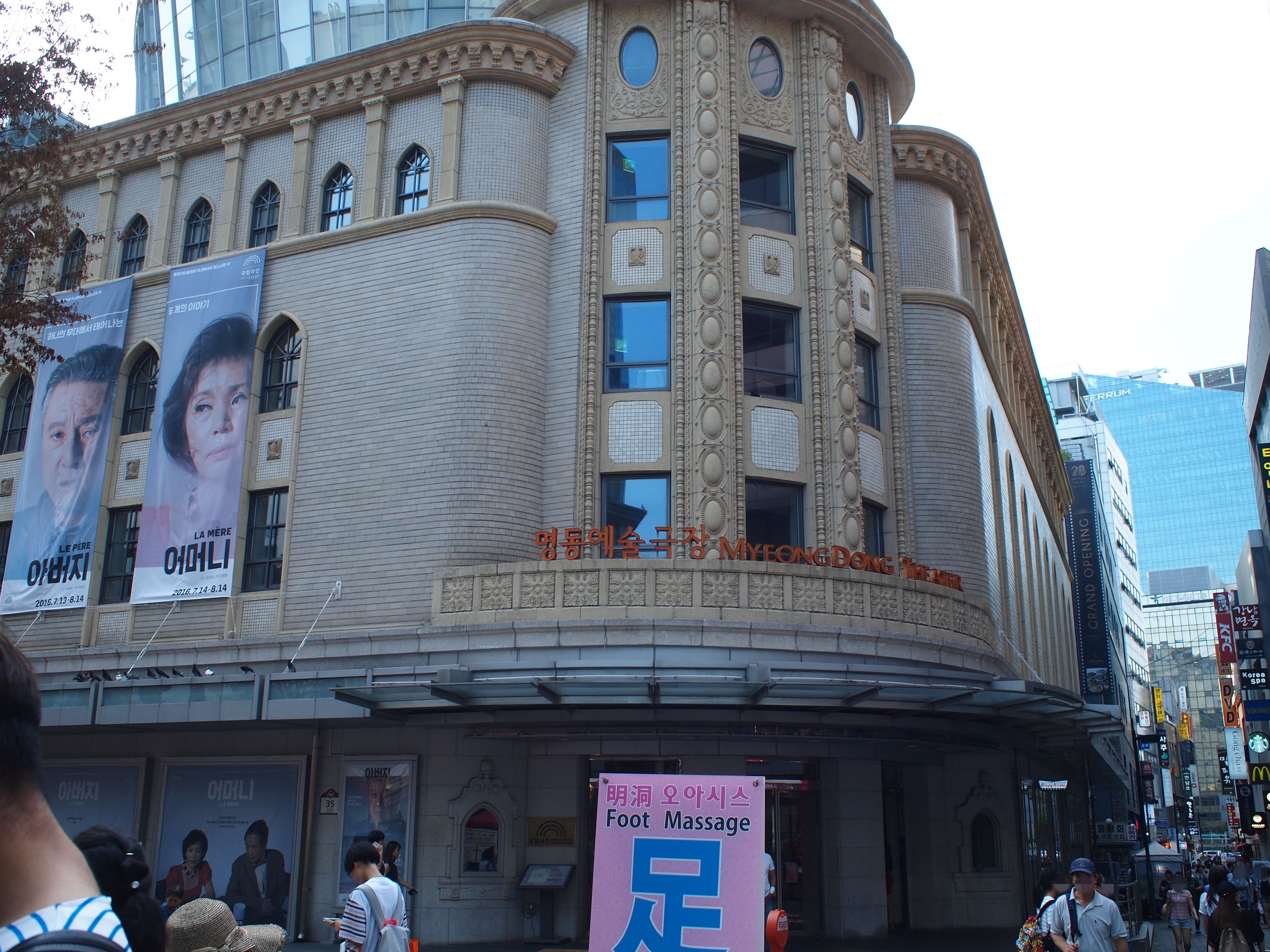 국립극단 명동예술극장 (명치좌)